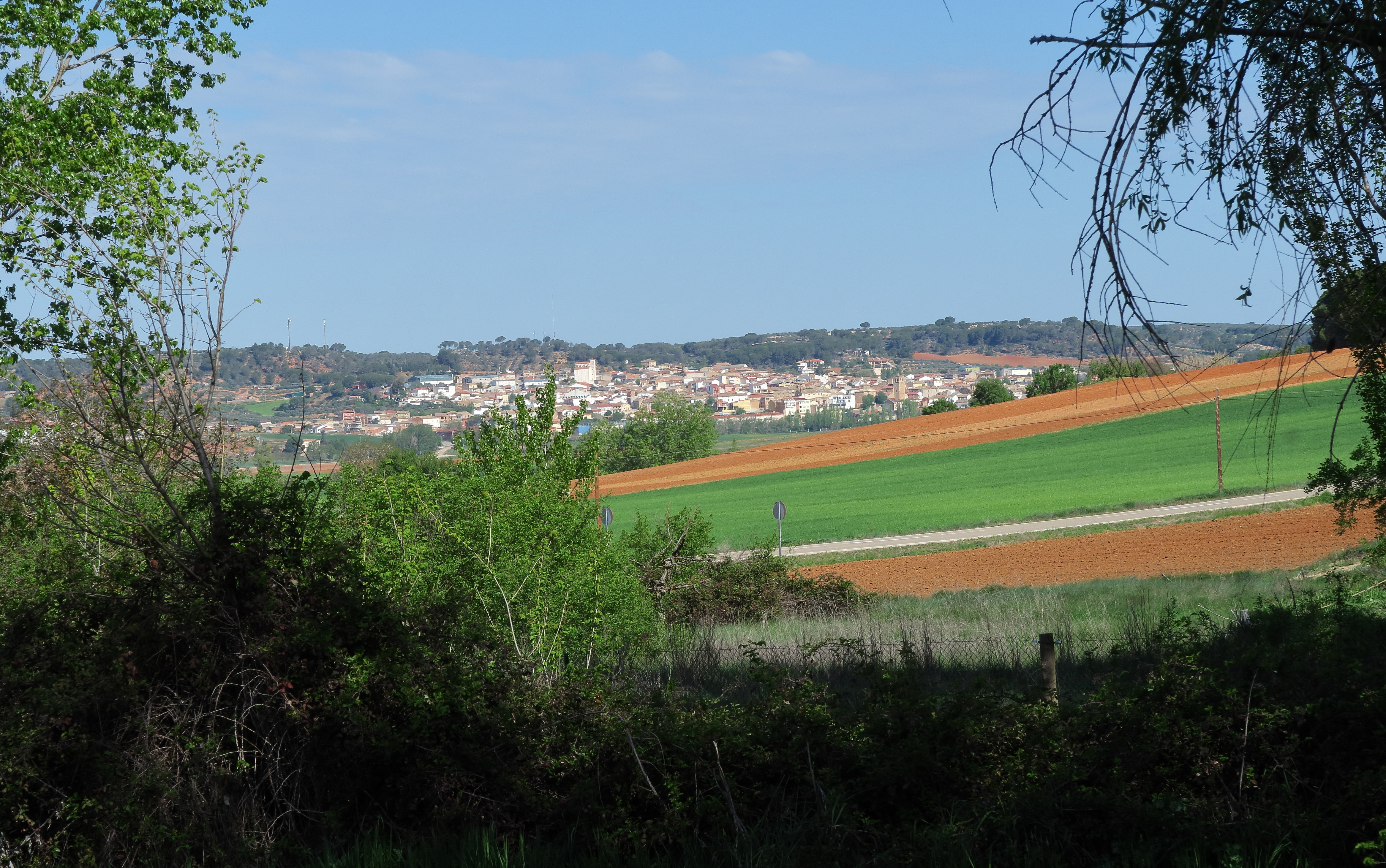 Valverde de Júcar, desde Hontecillas